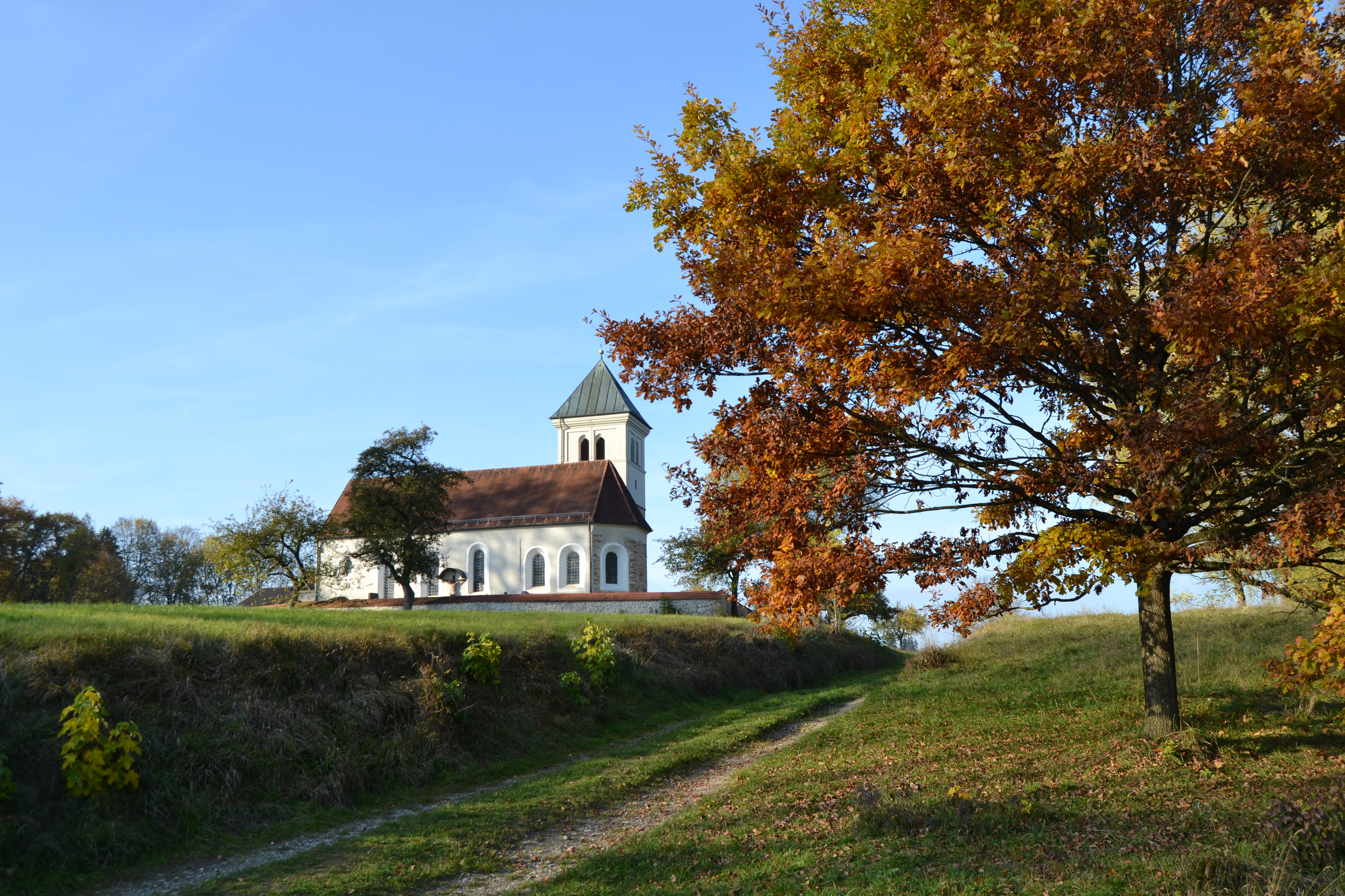 Kirche von Südosten